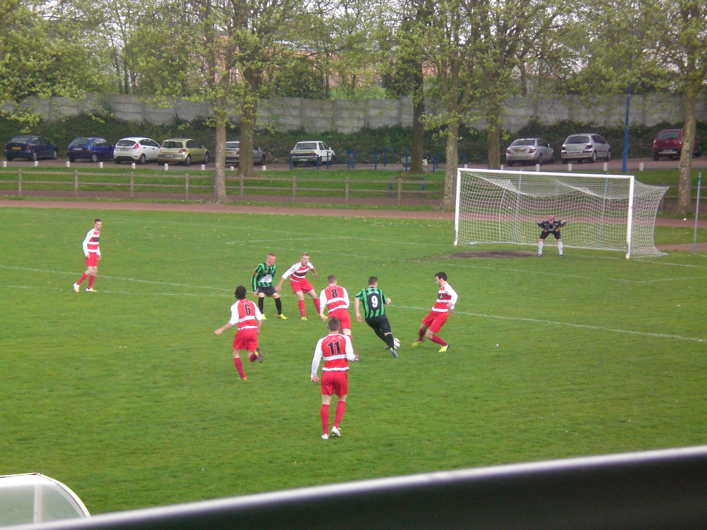 Match de football de Promotion de Ligue (10ème division) entre les Carabiniers de Billy-Montigny et l'AS Beuvry-la-Fôret, le 21 avril 2014, au Stade Paul Guerre de Billy-Montigny